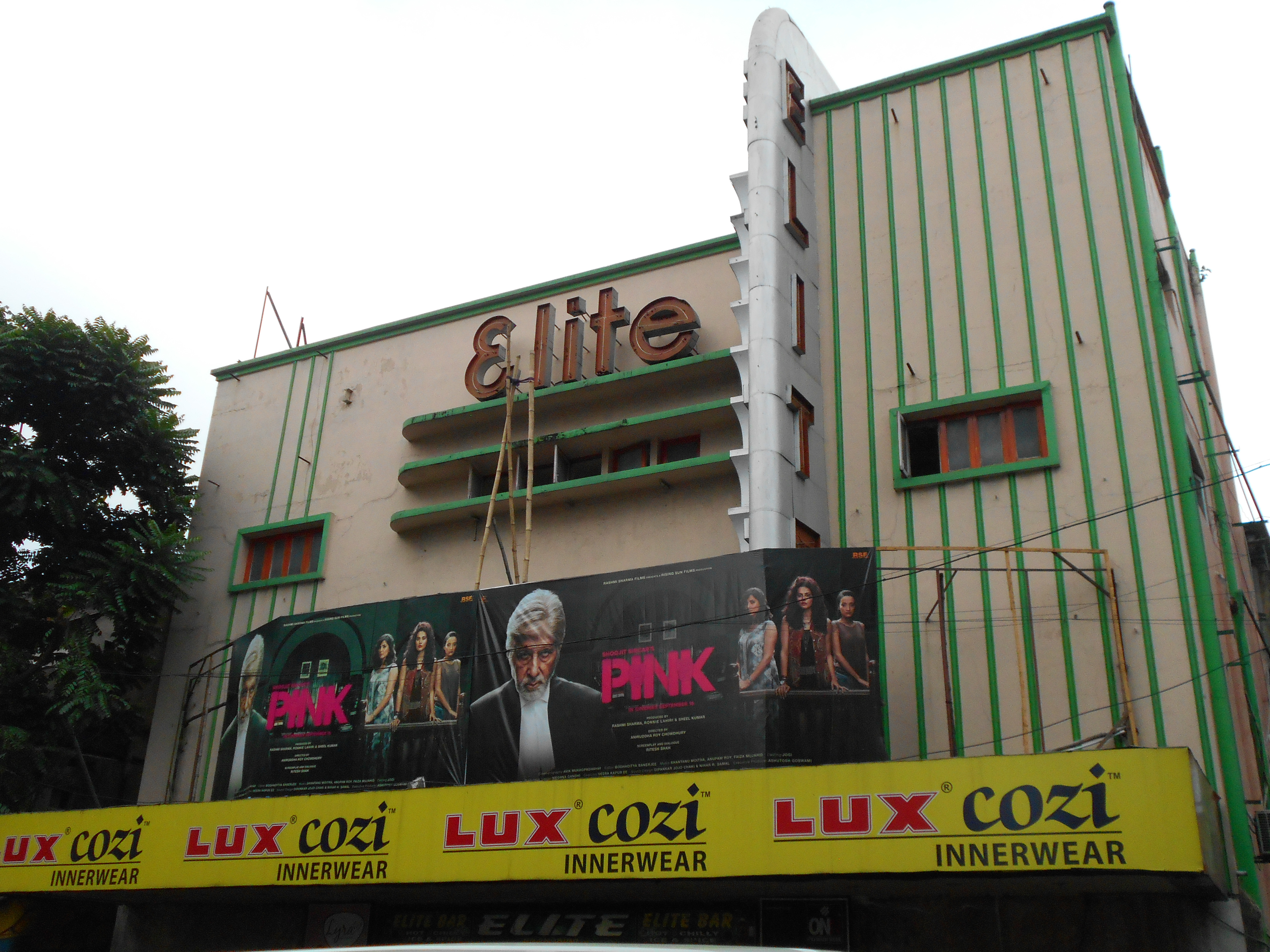 Elite Cinema Hall in Kolkata